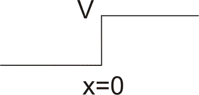 Две области с разной потенциальной энергией